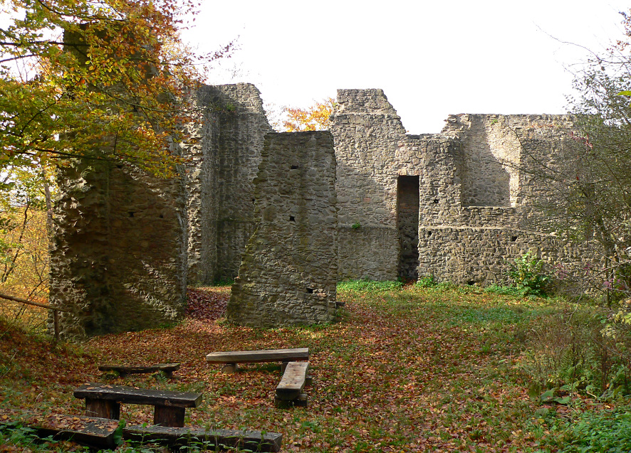 Burgruine Schönstein innen